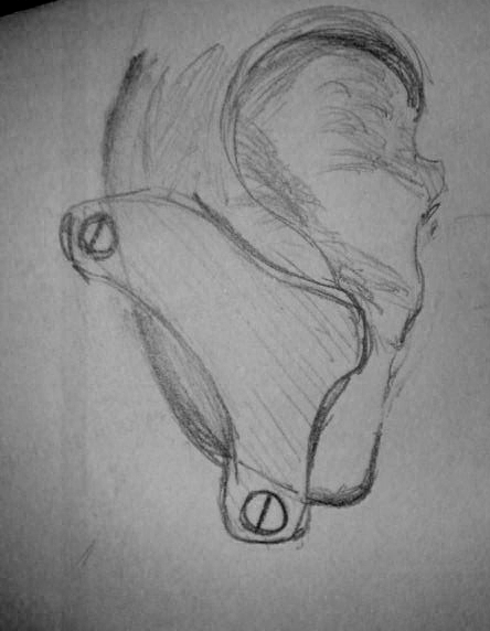 Uciskacz terapeutyczny płatka ucha